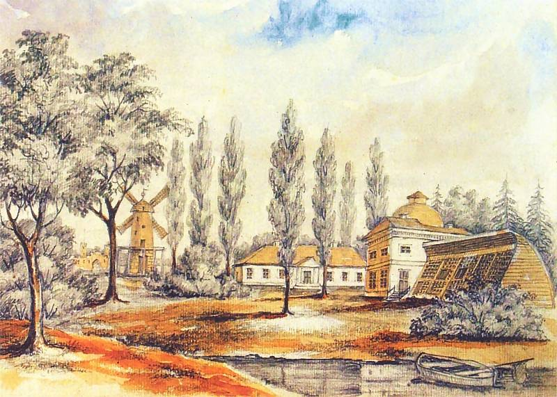 Беларуская (тарашкевіца): Пескі (Pieski), сядзіба Пуслоўскіх (Pusłoŭski)